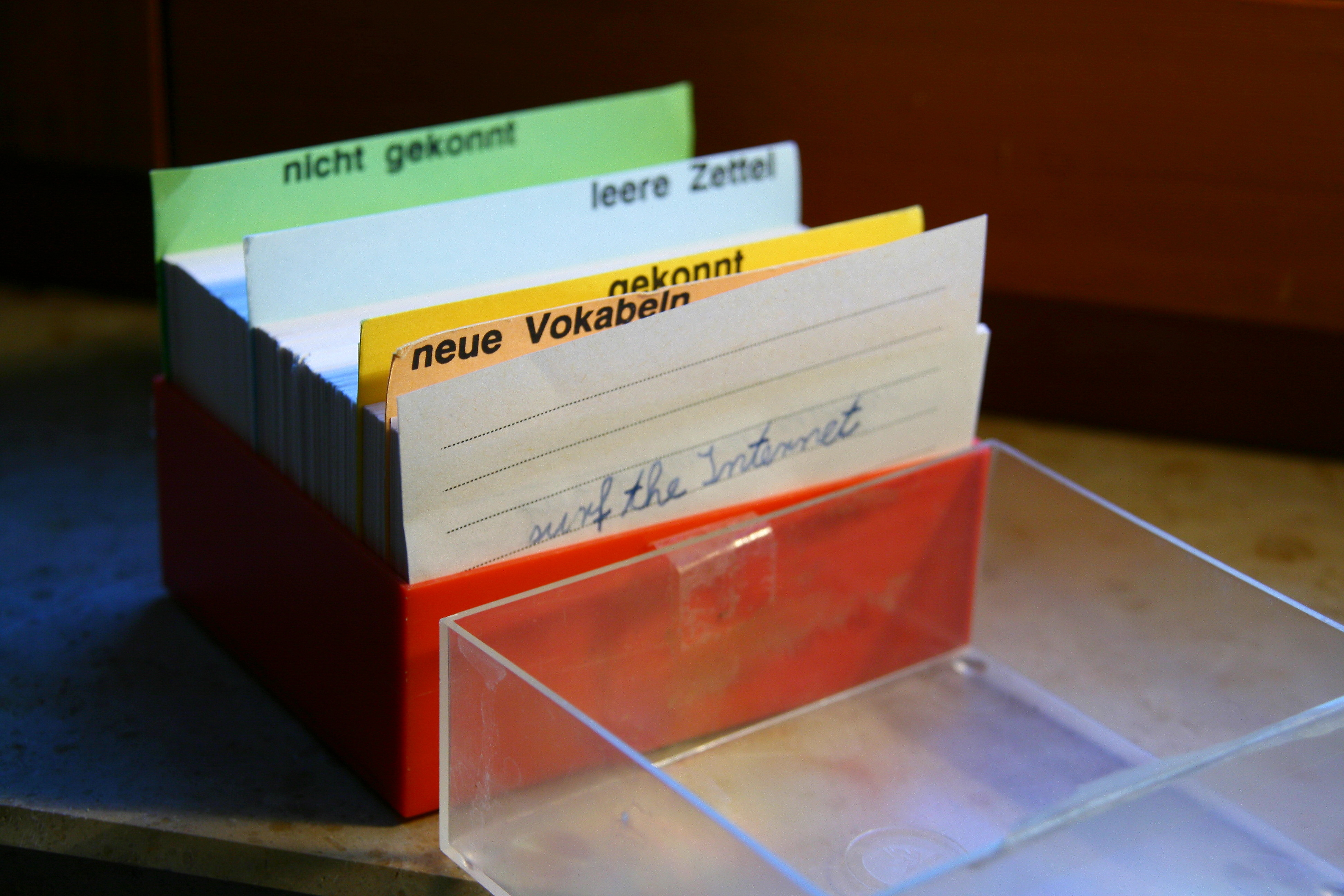 Lernkartei bzw. Vokabelbox At Home